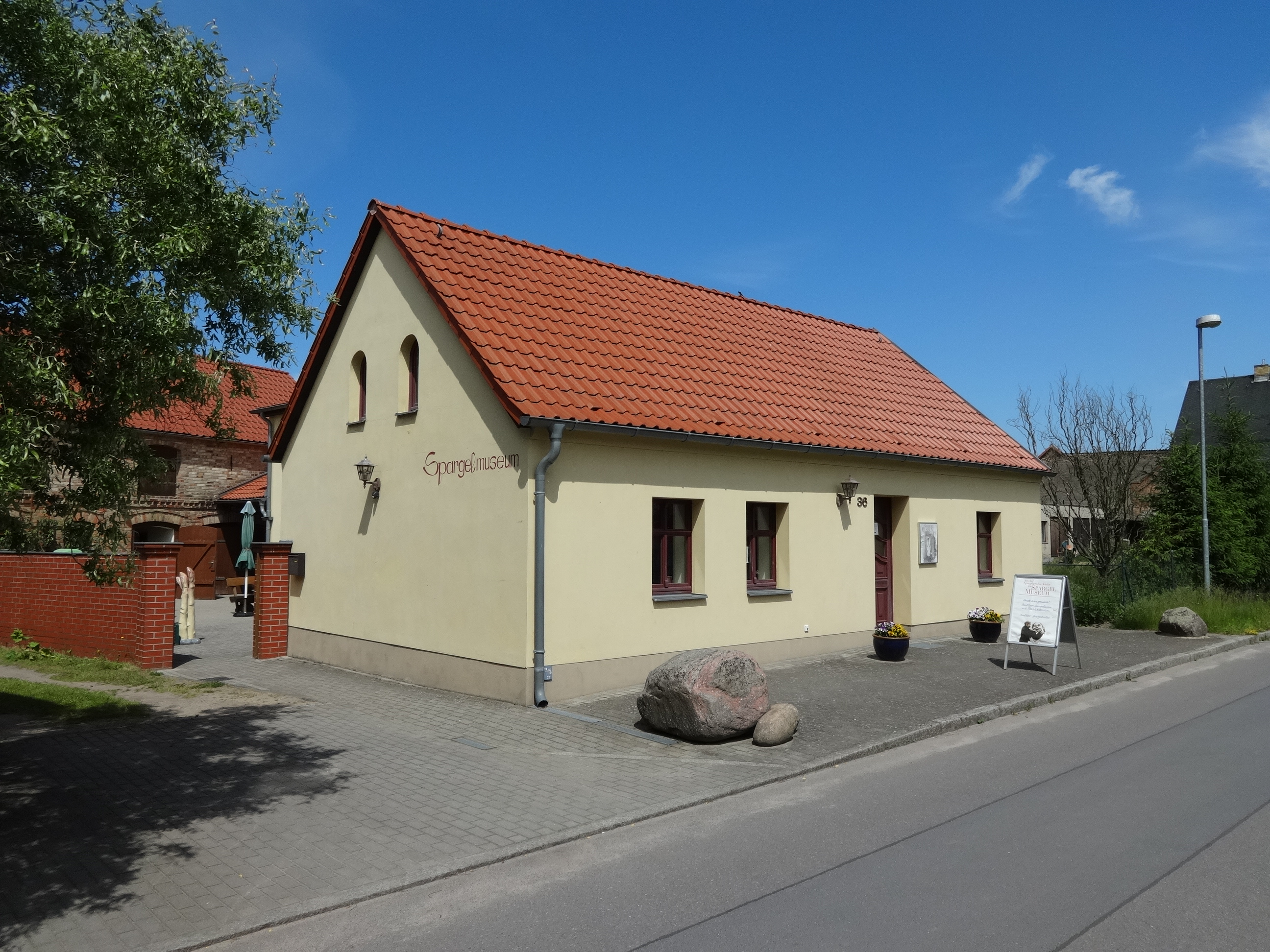 Spargelmuseum in Beelitz-Schlunkendorf